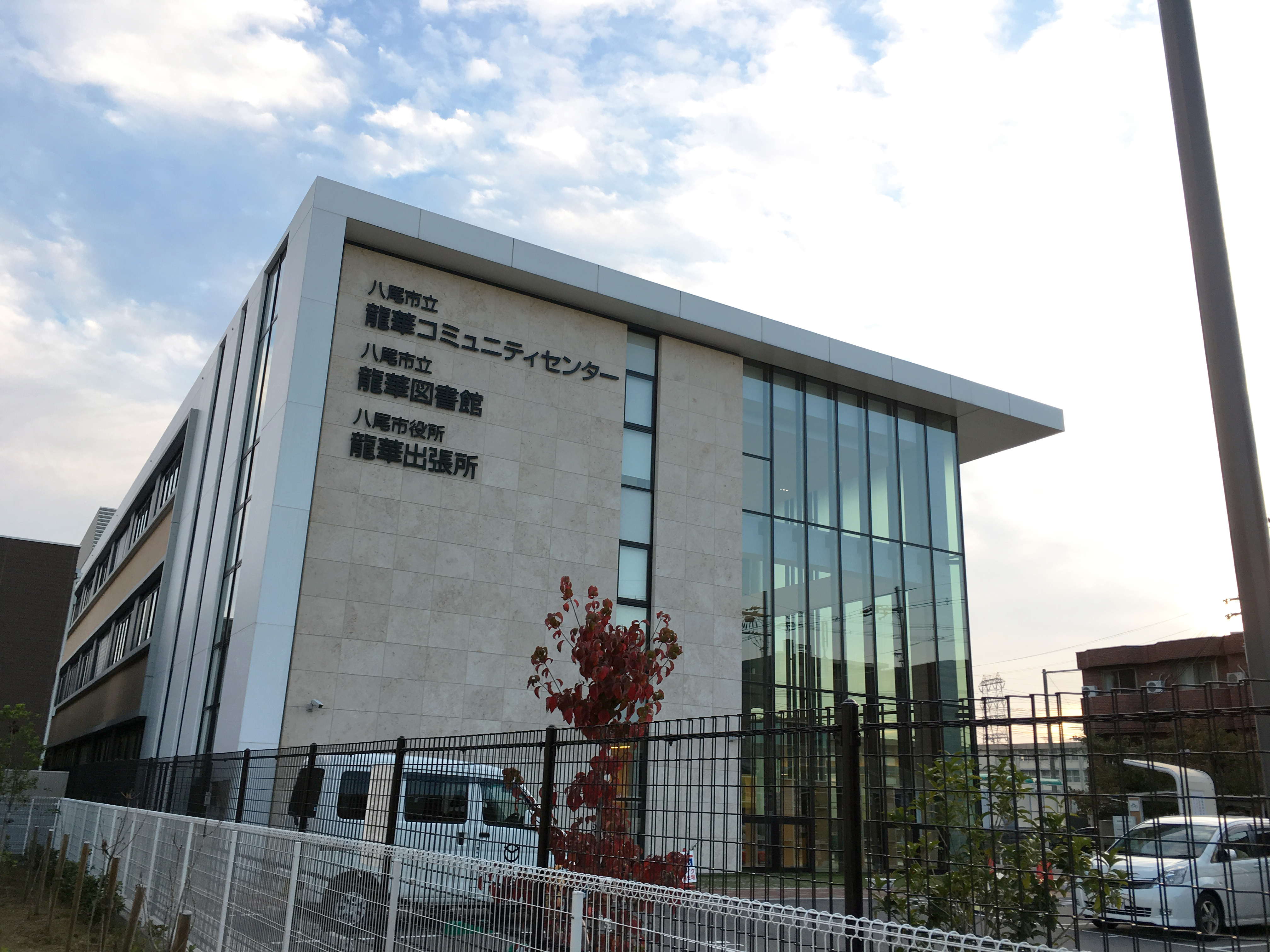 八尾市立龍華図書館